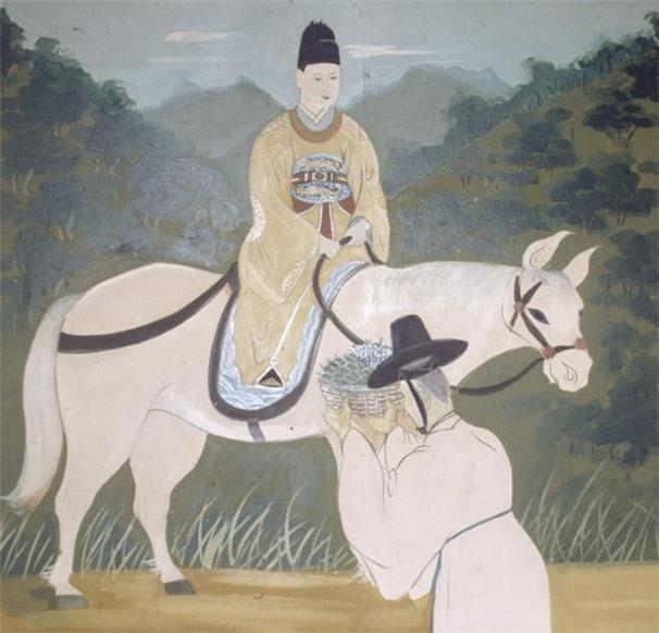 단종 어진 (강원도 영월군 영월읍 영흥리 영모전에 있는 1927년 이규진의 이모본)